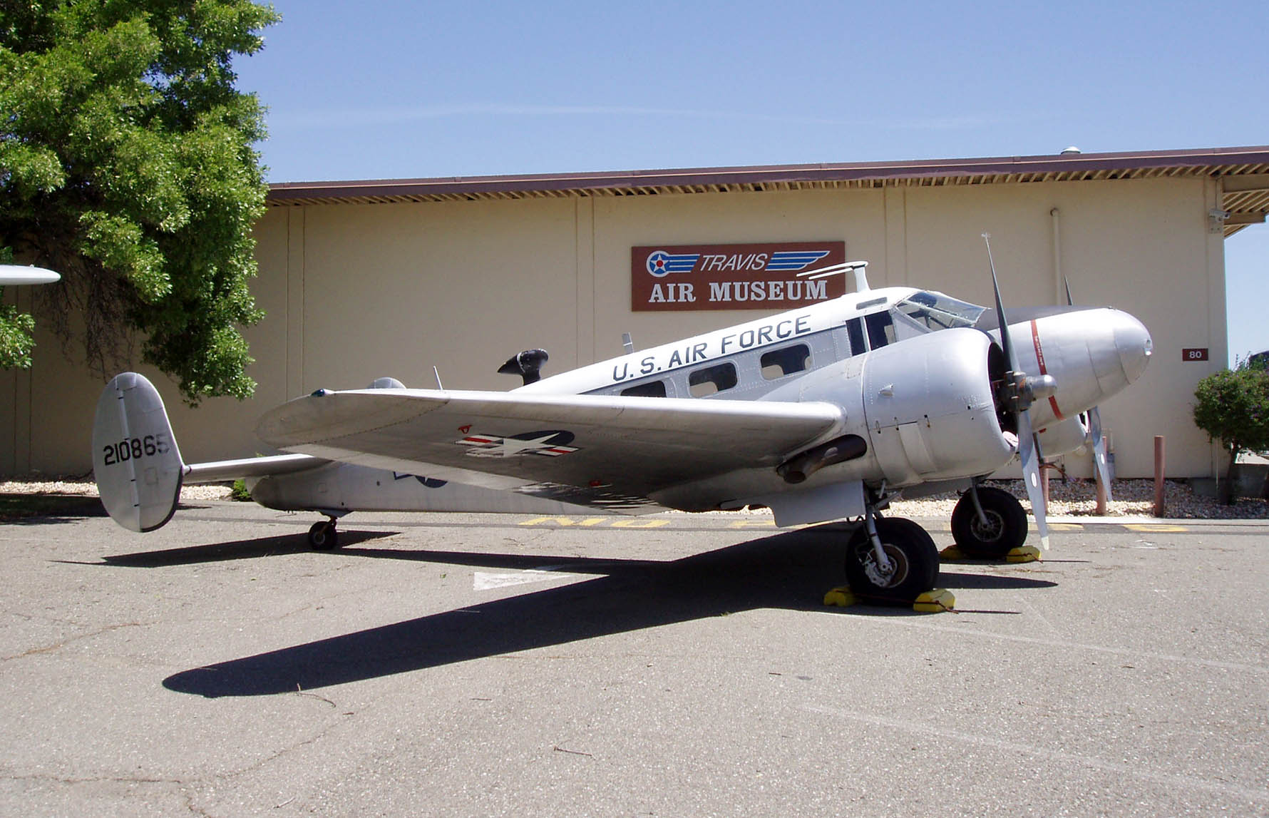 Travis Air Museum 2007